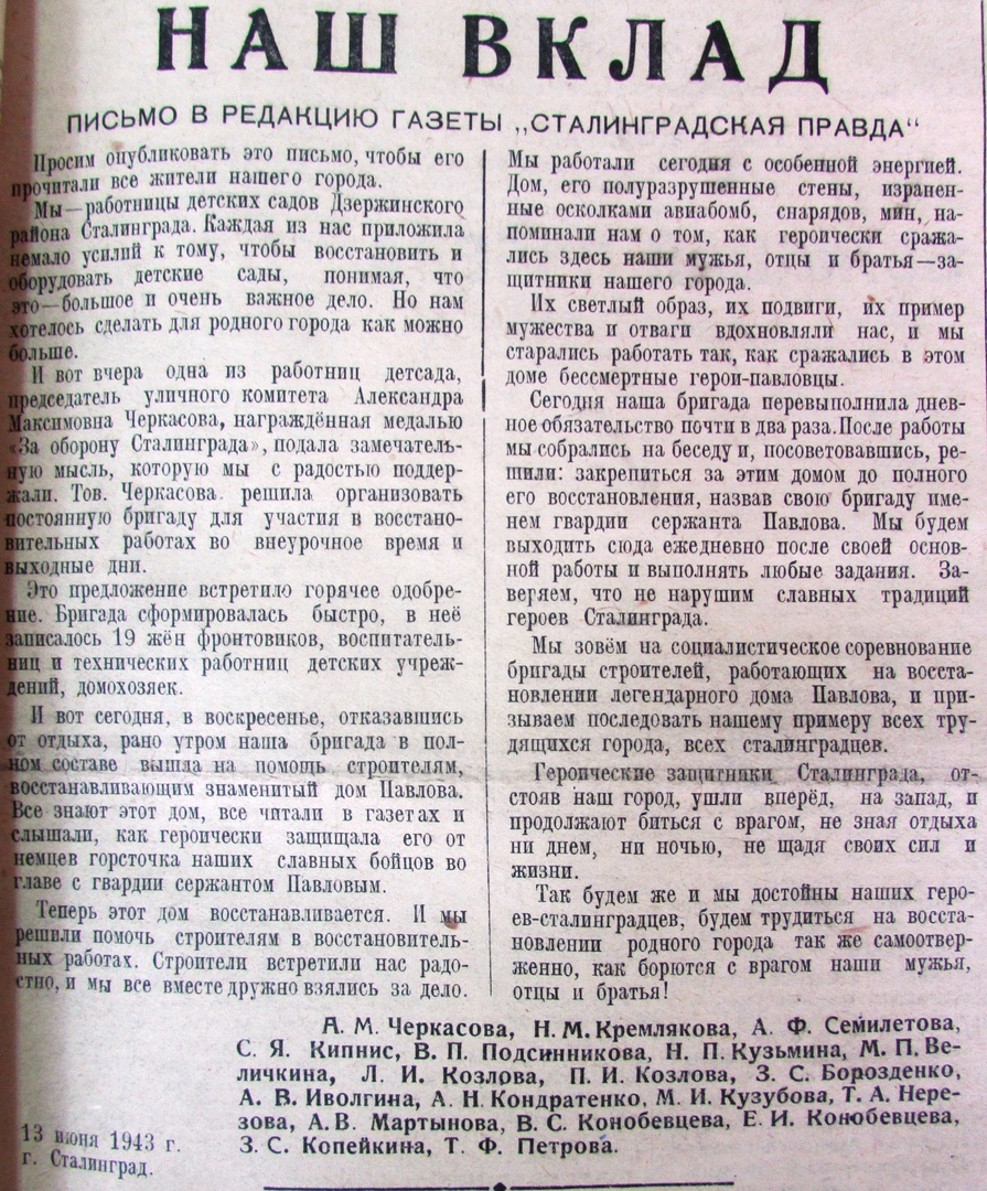 письмо было опубликовано в газете "Сталинградская правда" 15 июня 1943 года